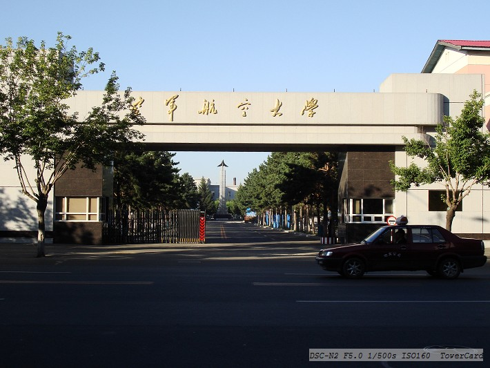 空军航空大学